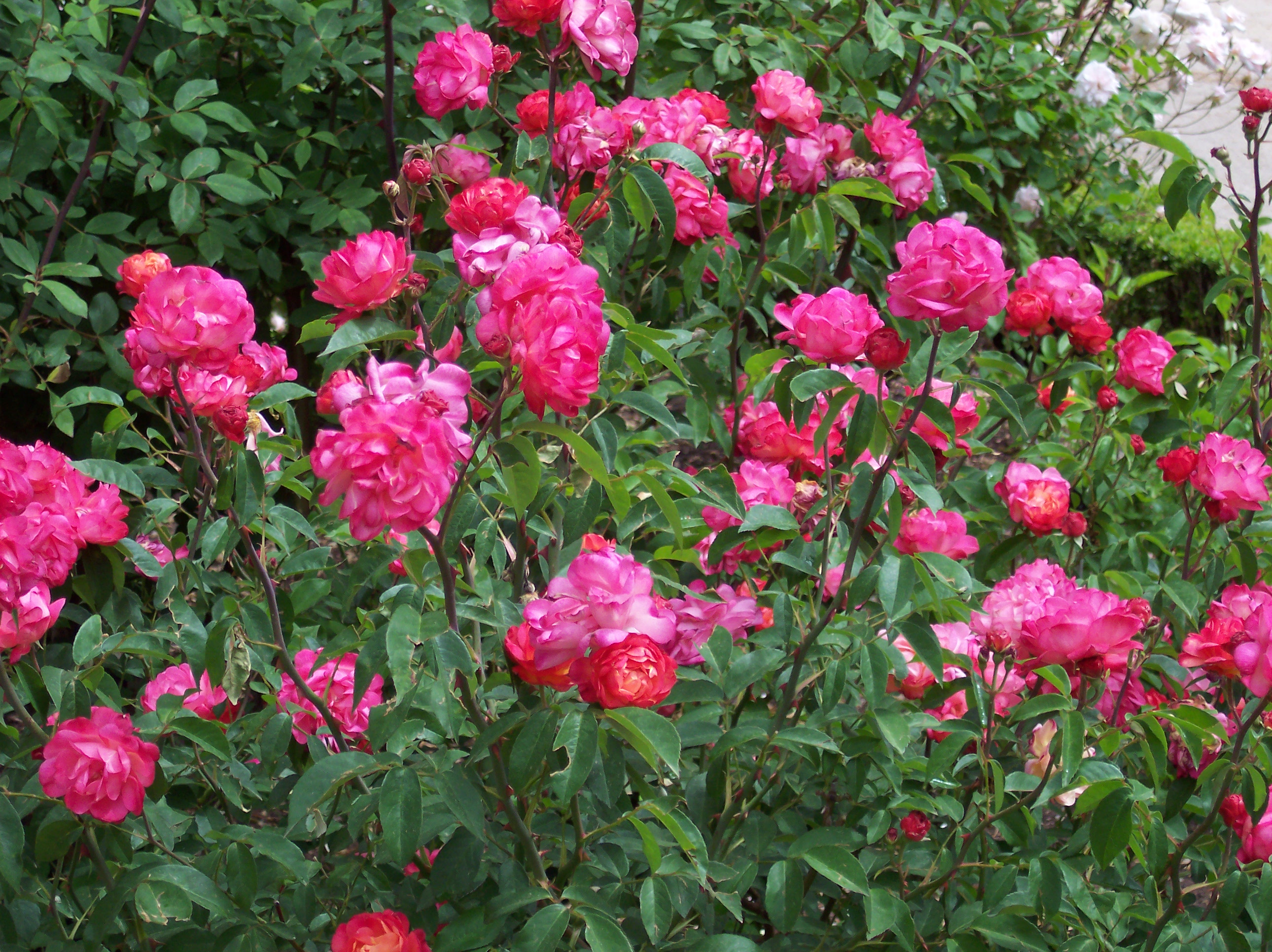 Rosa 'Leonie Lamesch', gr. Floribunda, sect. Synstylae. Real Jardín Botánico, Madrid